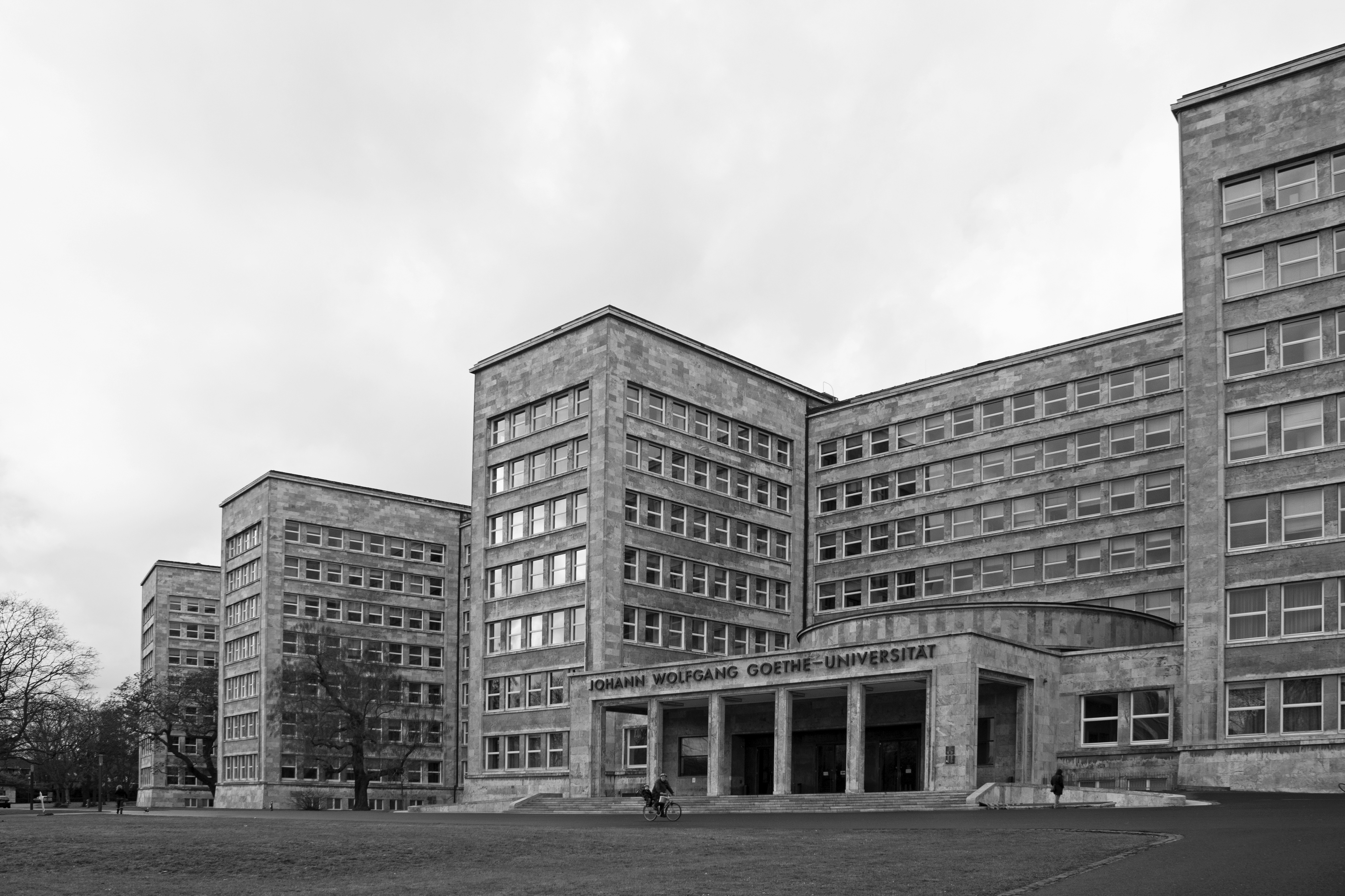 Hans Poelzig, Verwaltungsgebäude der I.G. Farben, Frankfurt am Main, 1928-1931; heute Johann-Wolfgang-Goethe-Universität